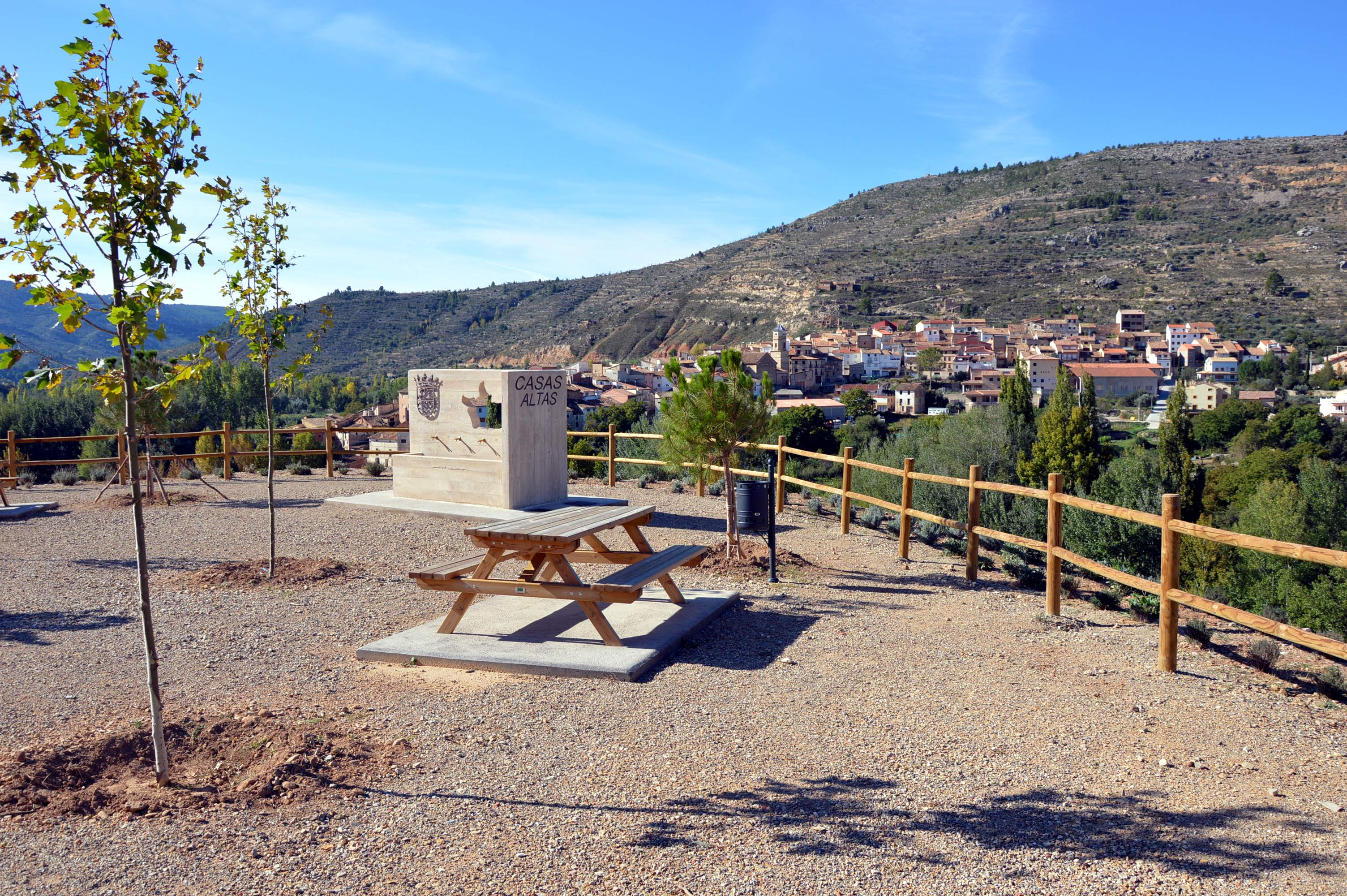 Vista parcial de Casasaltas (Valencia), desde el Mirador.